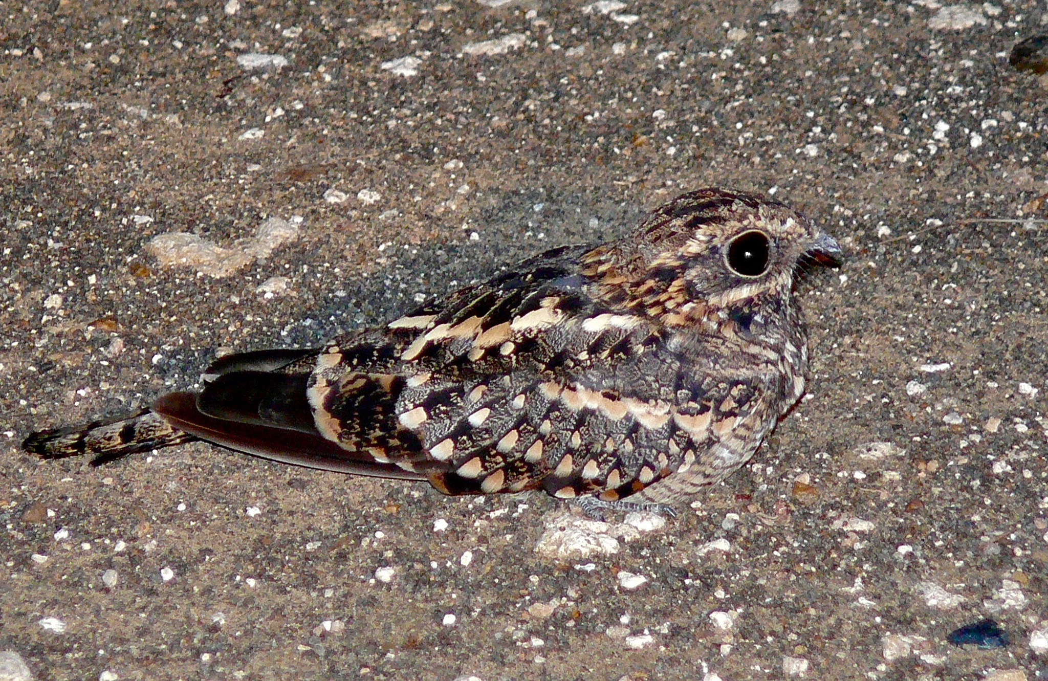 Shingwedzi Night Drive, Kruger NP, SOUTH AFRICA